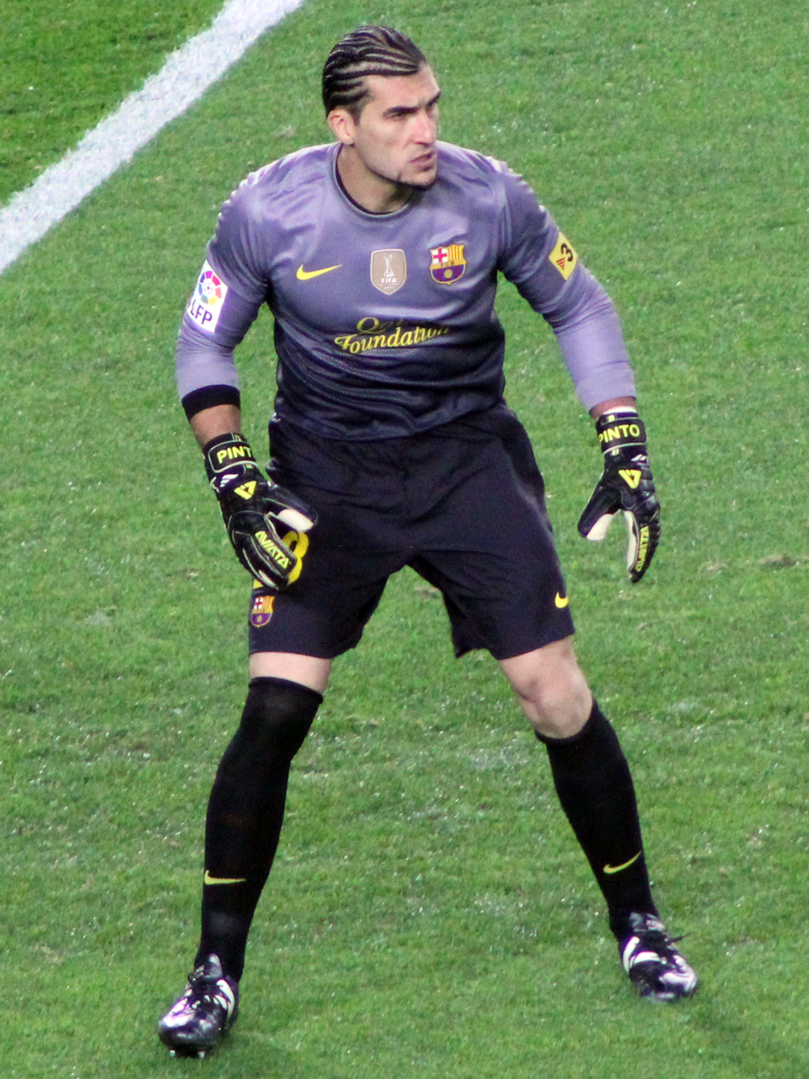 Foto realizada por Javier Segura (@castroquini en Twitter)